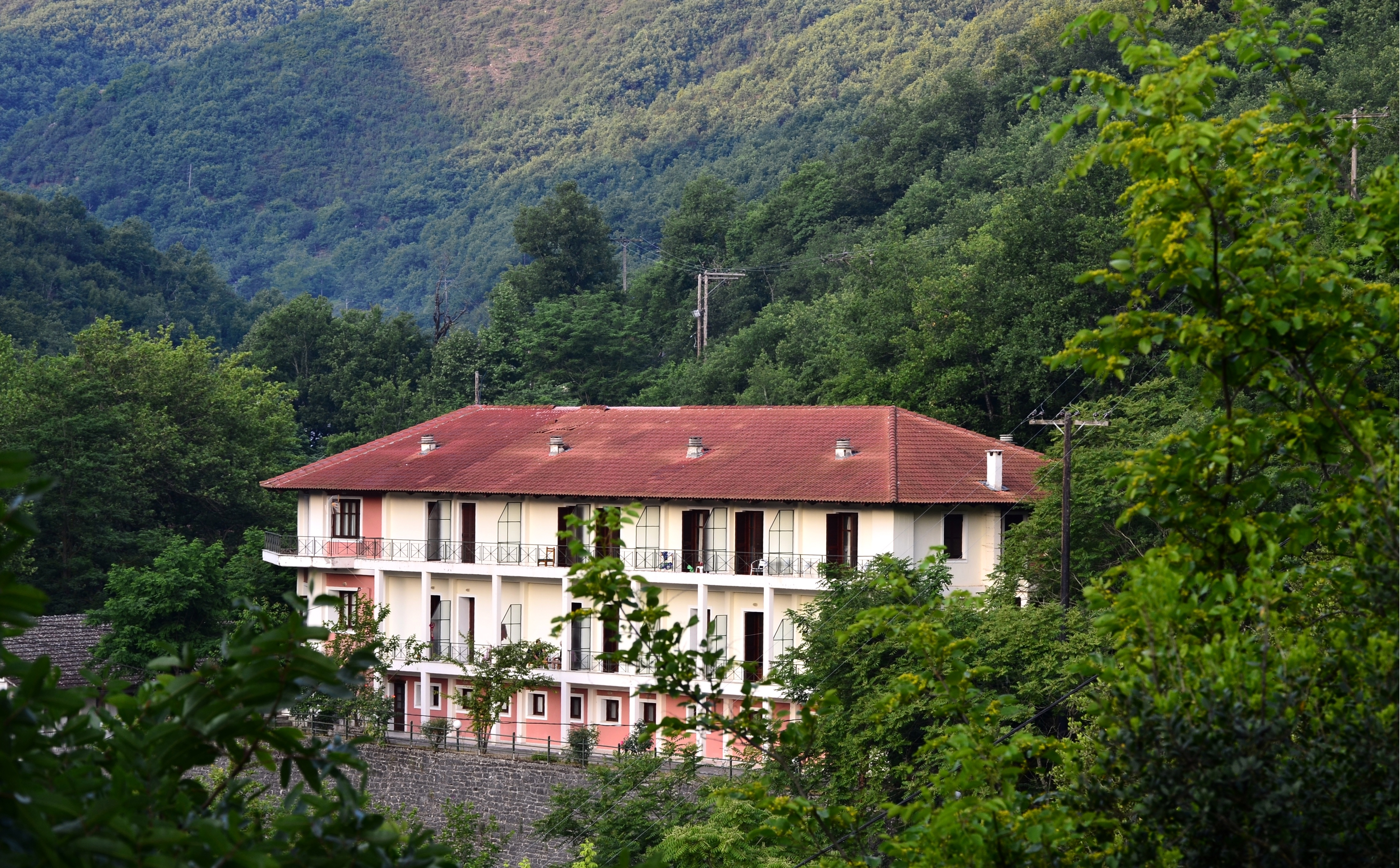 Λουτρά Σμοκόβου: Hotel Μετεωρα